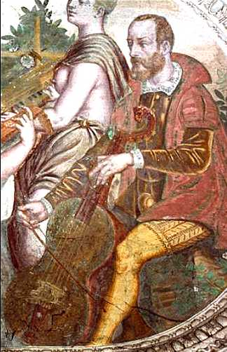 a guitar-shaped viola da gamba (viol). "Concerto", (original at Palazzo Maggi, Cadignano, Brescia).